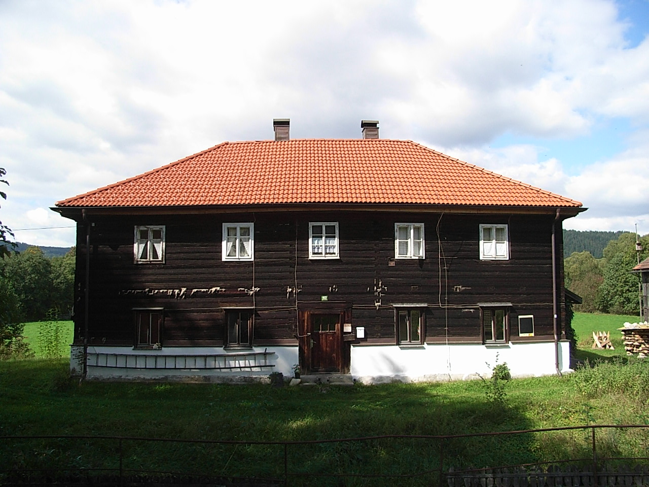 Wohnhaus in Theresienthal